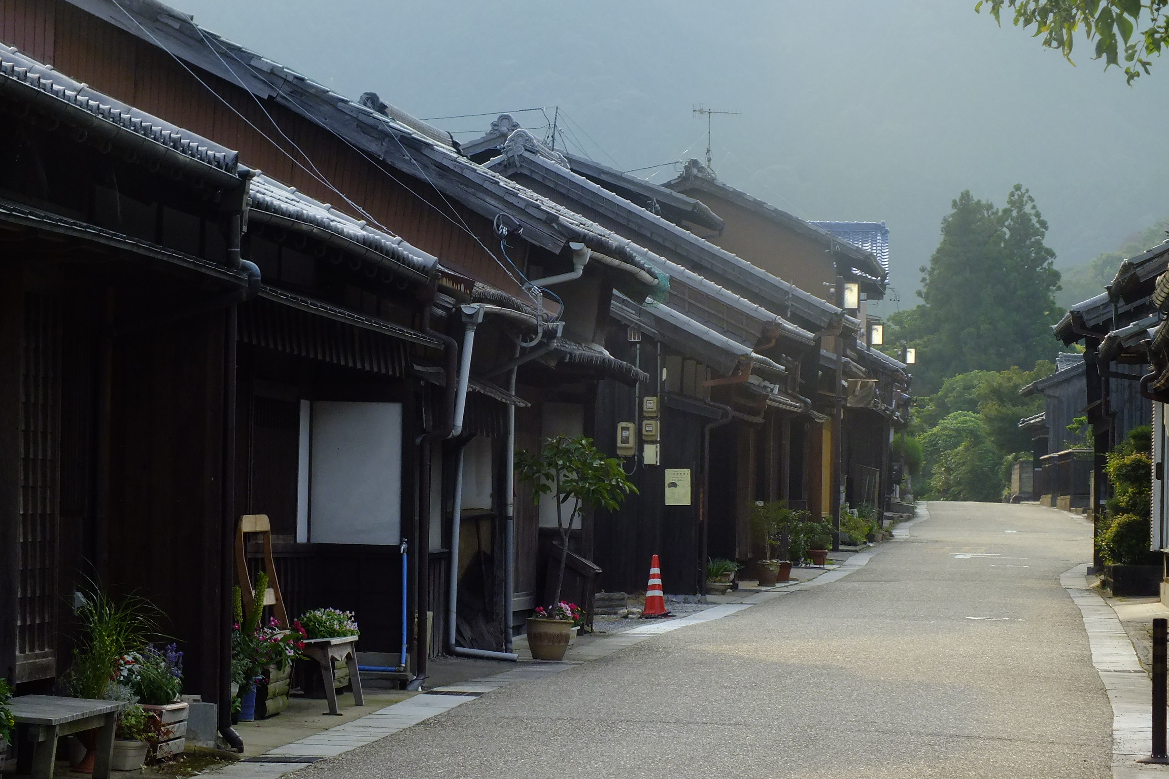 2016-08-05 Tokaido Seki Juku Kameyama City Mie,東海道五十三次 関宿